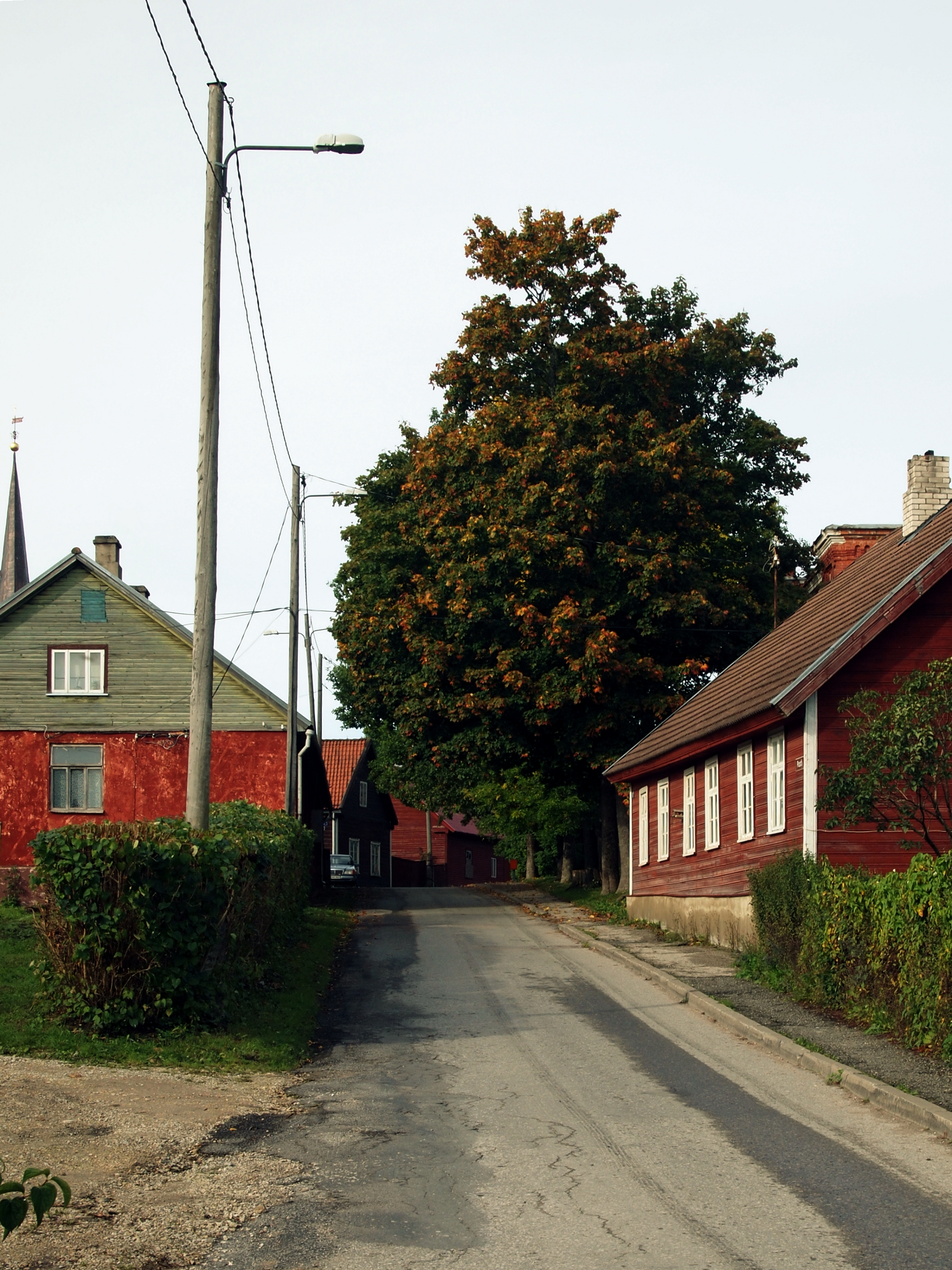 Posti tänav Paides